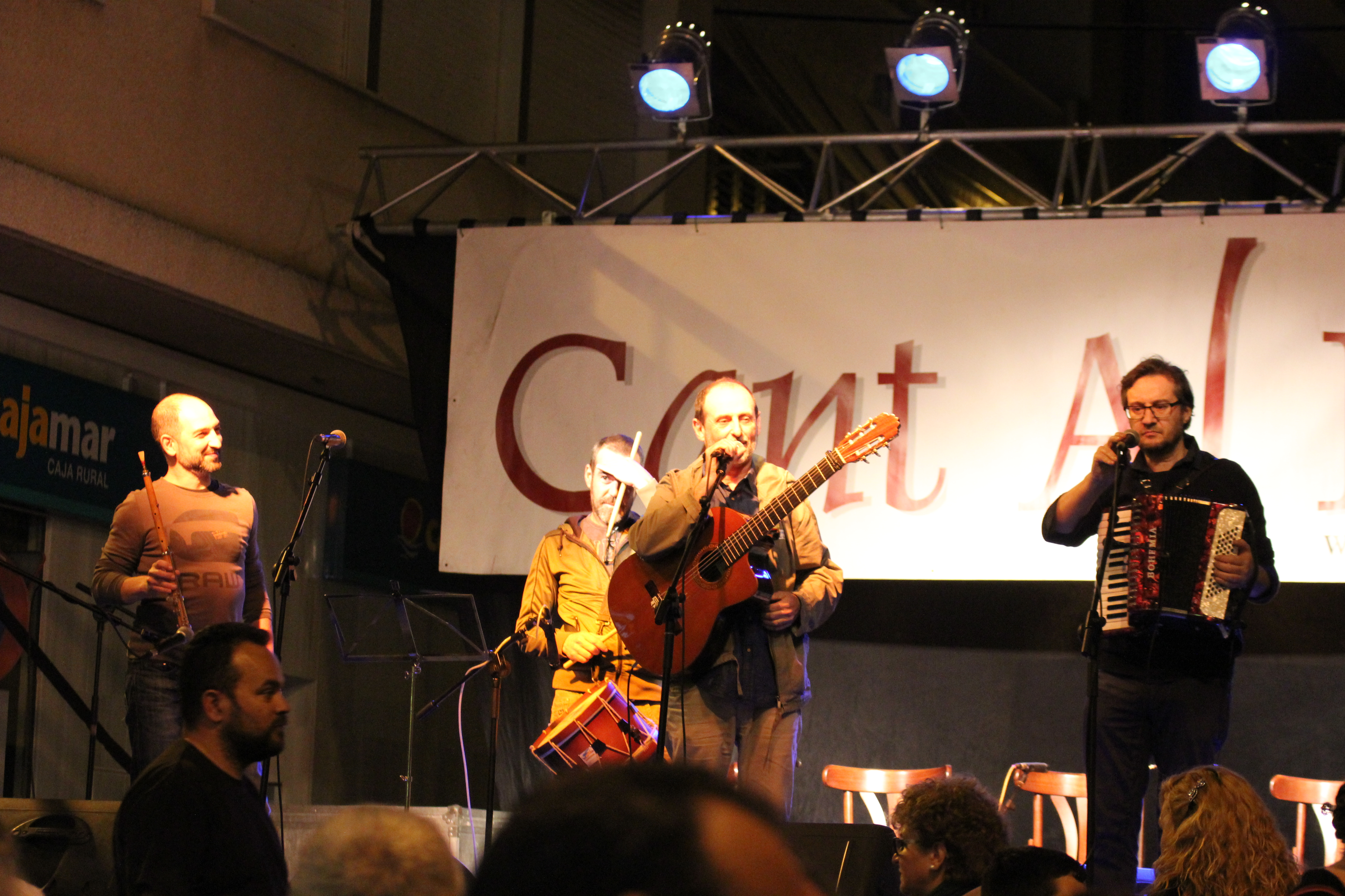 Urbàlia Rurana al Cant al Ras de Massalfassar 2016